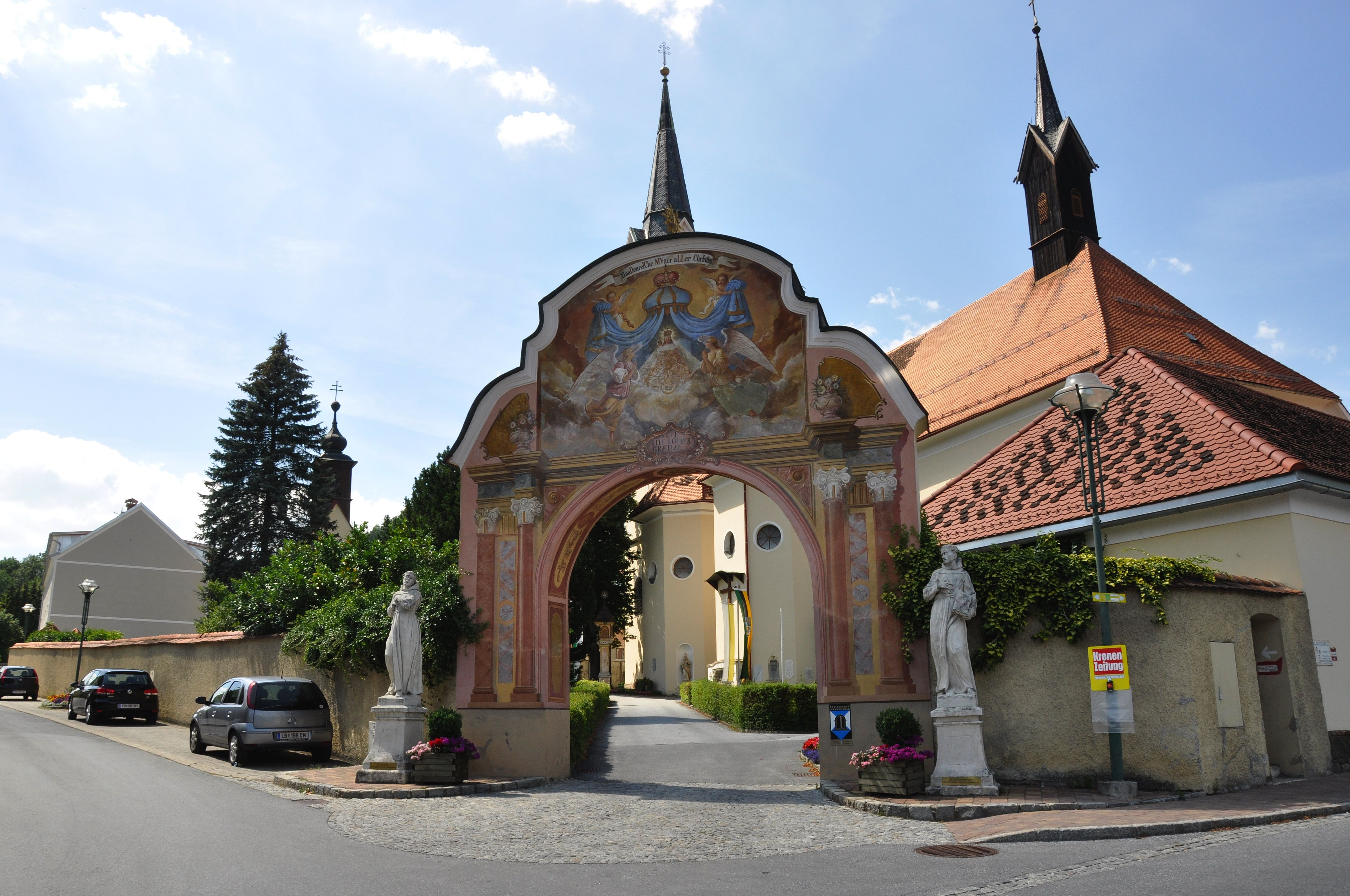 Kath. Pfarrkirche, Wallfahrtskirche Mariä Himmelfahrt